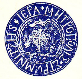 Печат на гръцката митрополия в Струмица